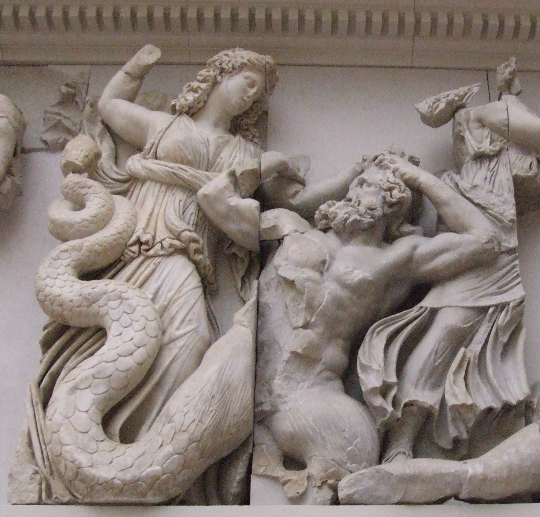 Pergamonmuseum Berlin, Pergamonaltar, Gigantomachie, Die drei Moiren (Schicksalgöttinnen) erschlagen mit Bronzekeulen die Giganten Agrios und Thoas, The moirs struck Agrios and Thoas while gigantomachy